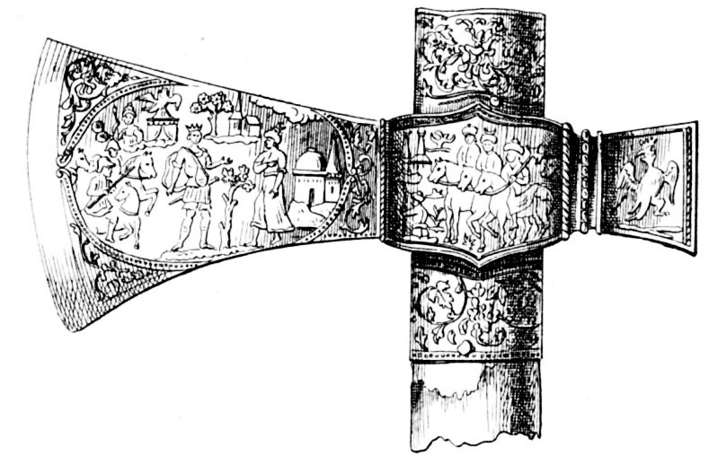 ilustracja z książki Zygmunta Glogera "Encyklopedia staropolska tom I" publikacja Wydawnictwa Piotra Laskauera i S-ki Warszawa 1900